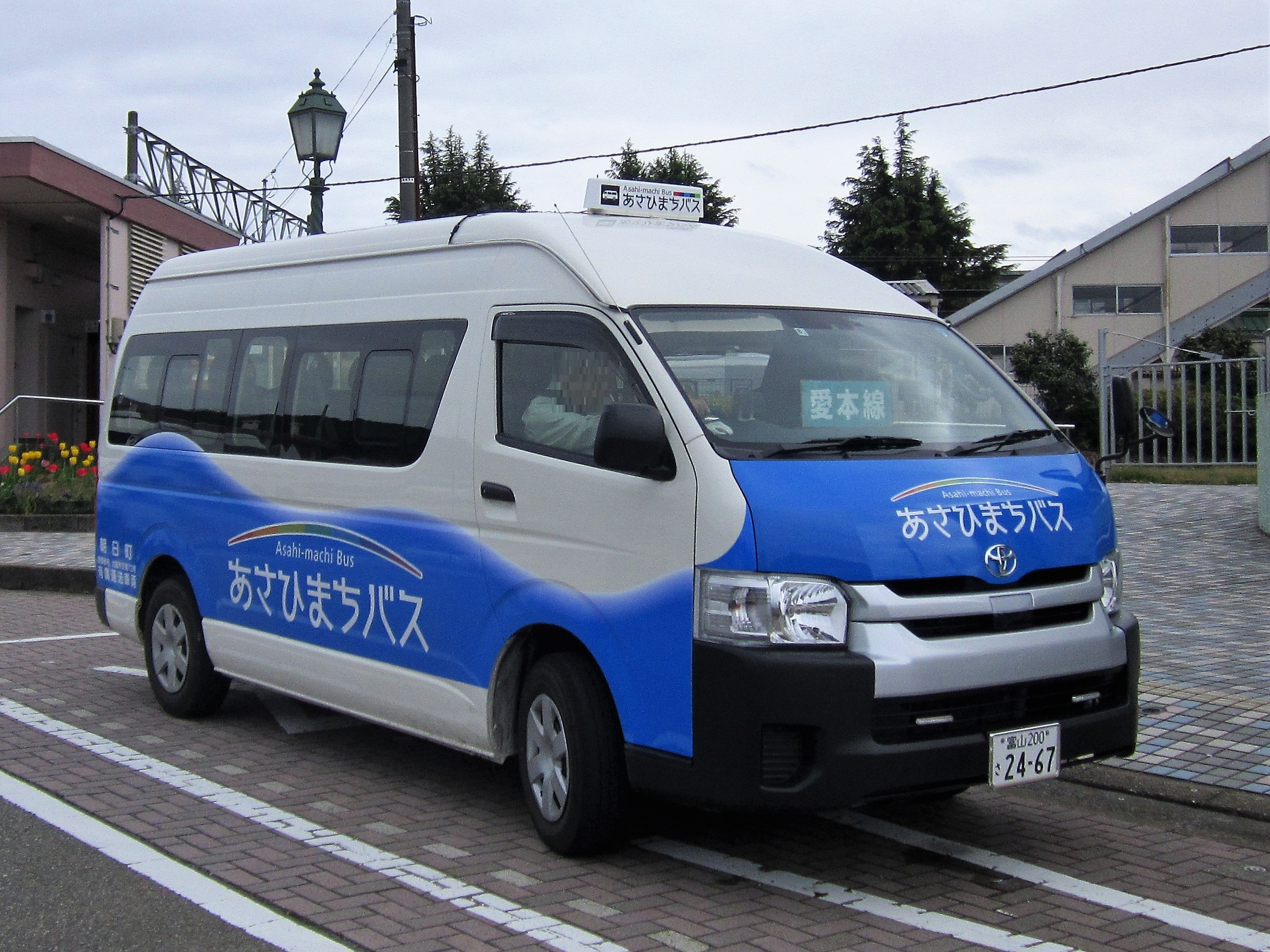 あさひまちバス愛本線（泊駅前） Canon PowerShot A2200